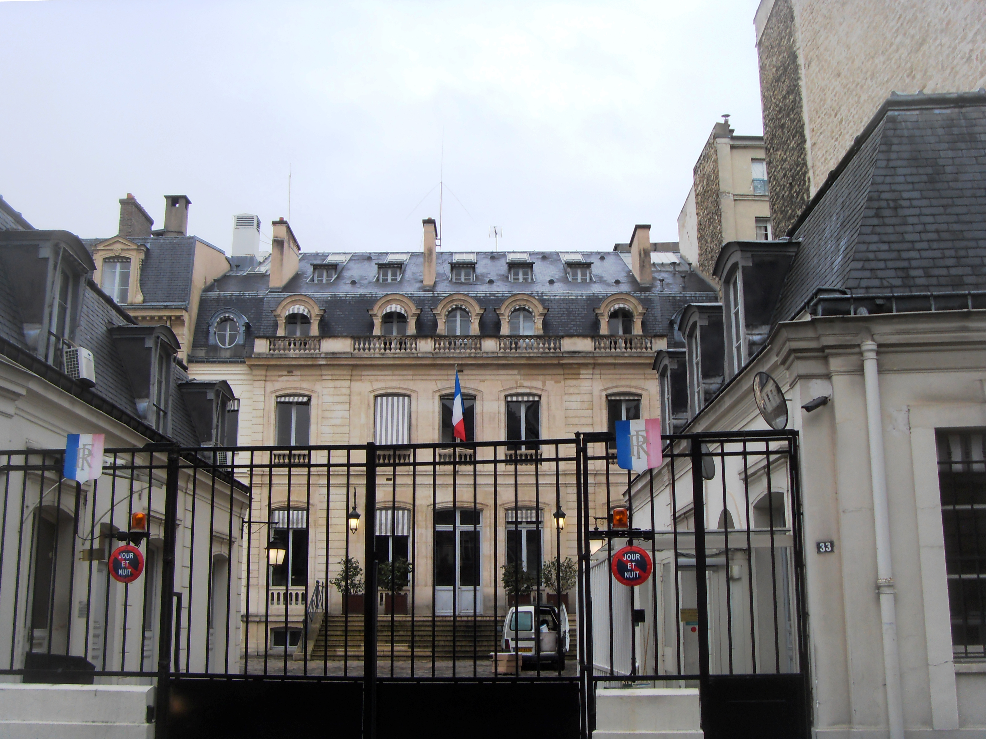 n°33 rue Barbet-de-Jouy (Paris)